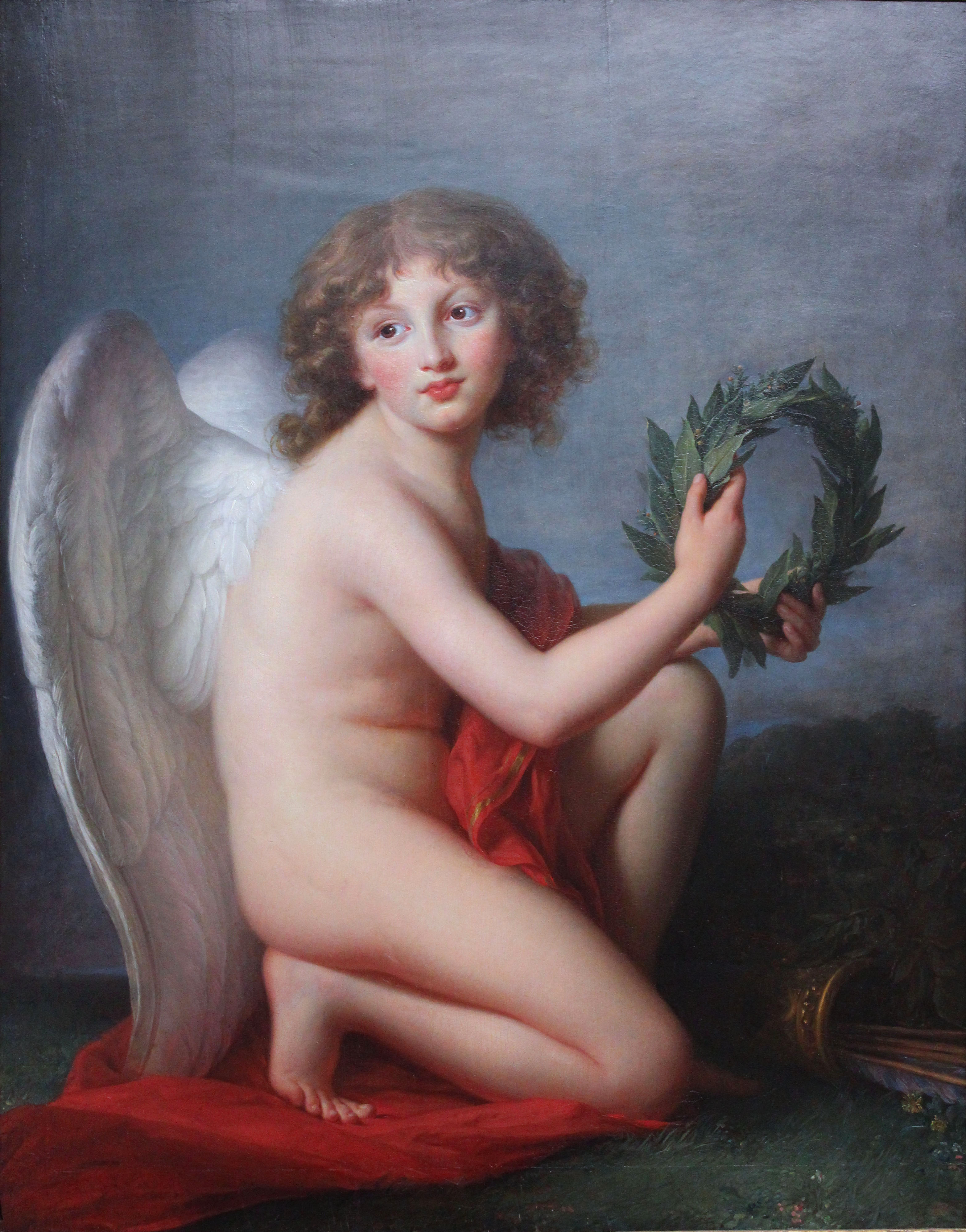 Prinz Heinrich Lubomirski (1777-1850)